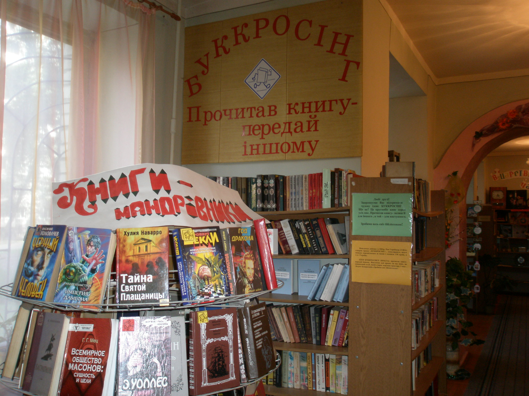 Буккроссинг в библиотеке